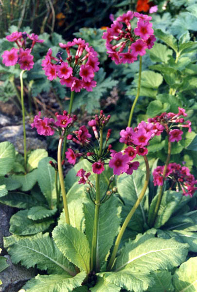 Primula burmanica